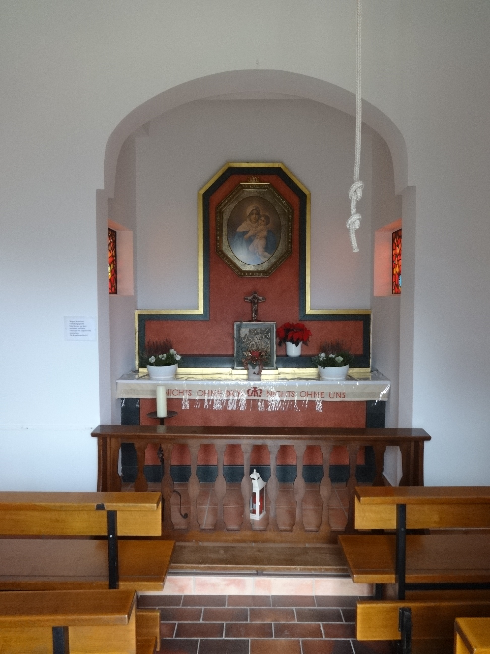 Die Marienkapelle ist ein denkmalgeschütztes Bauwerk im Baden-Badener-Ortsteil Lichtental. Es geht auf einen Bildstock aus dem Jahr 1770 zurück und wurde in seiner über 240-jährigen Geschichte mehrfach umgebaut und renoviert. In seinem Innern befindet sich ein Gemälde von Josef Kentenich, dem Gründer der Schönstattbewegung.